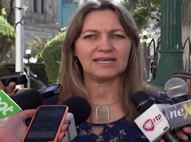 Elizabeth Reyes Limpias en 2018